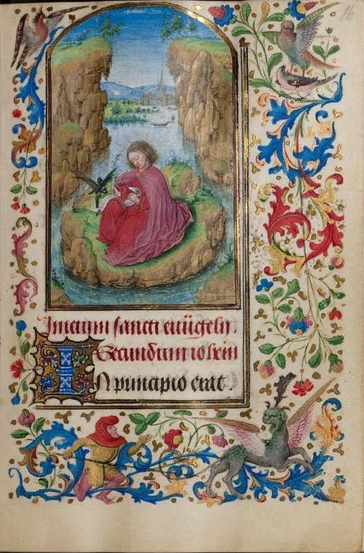 Sachsenheim-Gebetbuch, fol. 16r, Miniatur: Der Evangelist Johannes auf Patmos mit einem tintenfasshaltenden Adler, Bordüre: stilisierte Akanthus- und Blütenranken, auf eine Taube herabstoßender Falke, Vogel mit großen, ausgebreiteten Schwingen, Mann jagt ein geflügeltes Fabeltier.